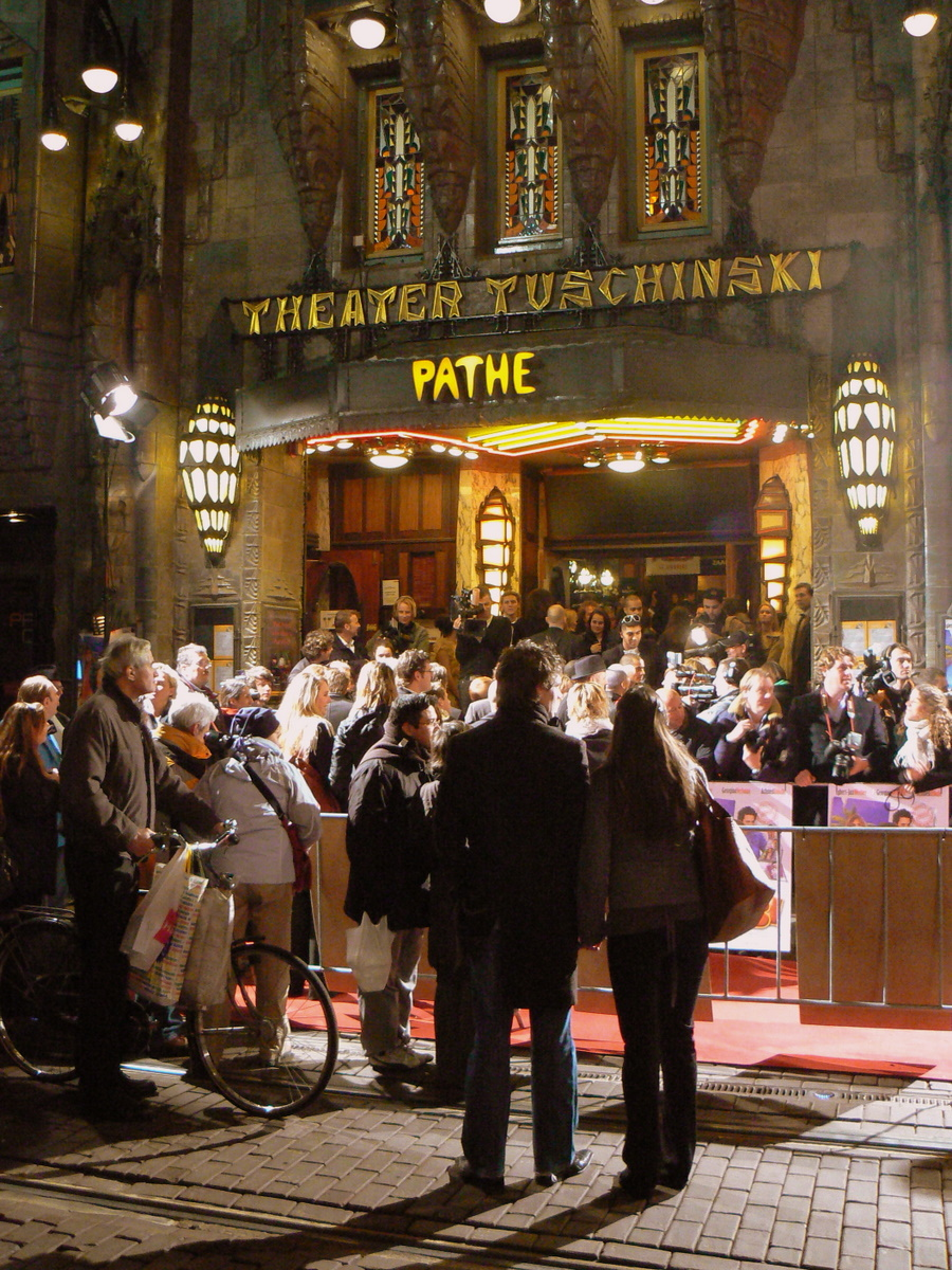 Première van de Nederlandse film 'Alibi' bij Pathé Tuschinski in Amsterdam op 11 februari 2008.